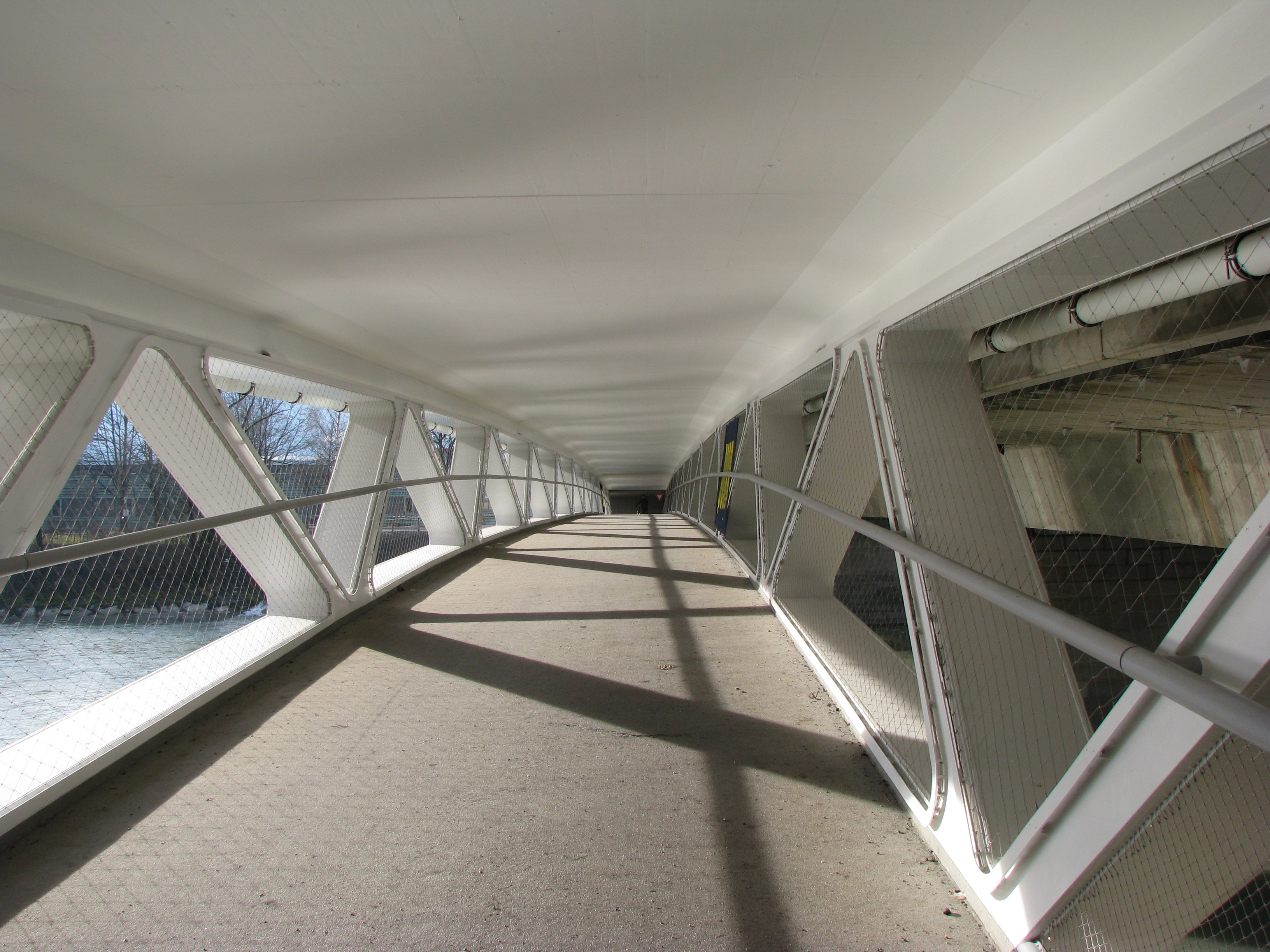 Innsbruck, Grenobler Brücke, Blick über die Fußgängerbrücke Richtung Reichenau